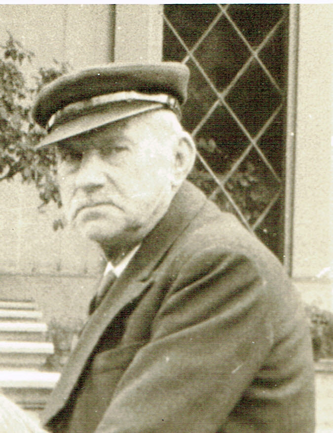 Tramway de Verneuil à Melun